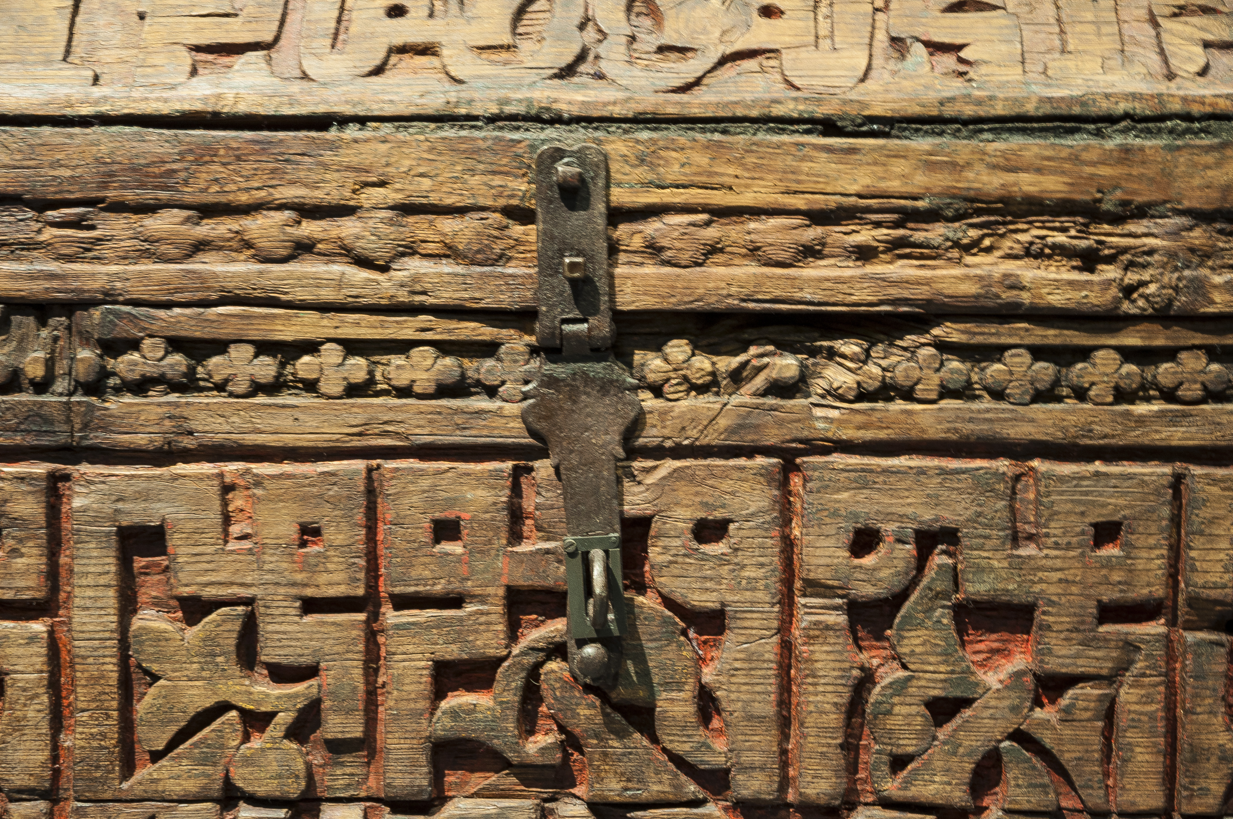 Coffre en bois sculpté et peint ( détails ).